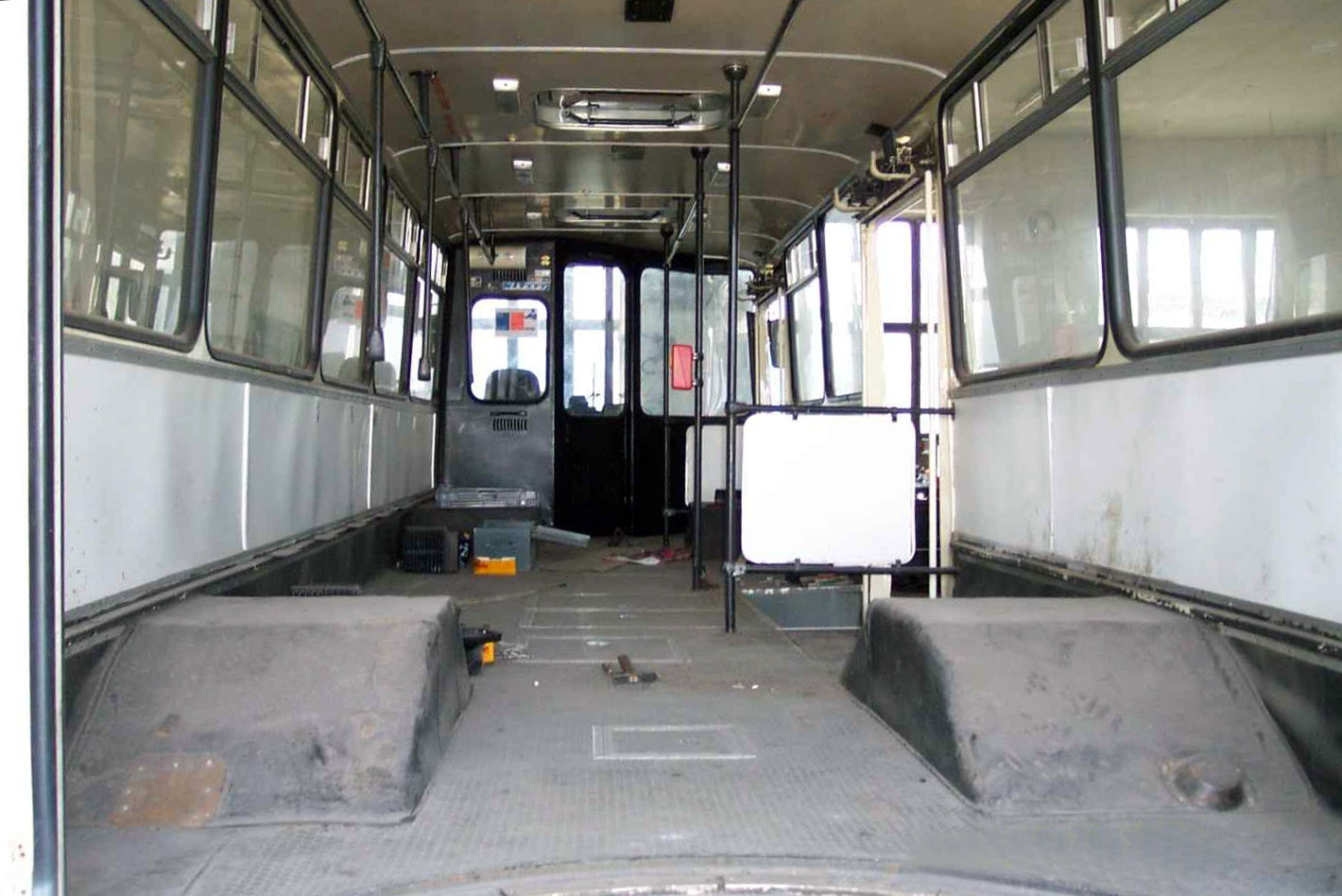 Brno-Řečkovice, přední článek autobusu Ikarus 280 (demontovaný).